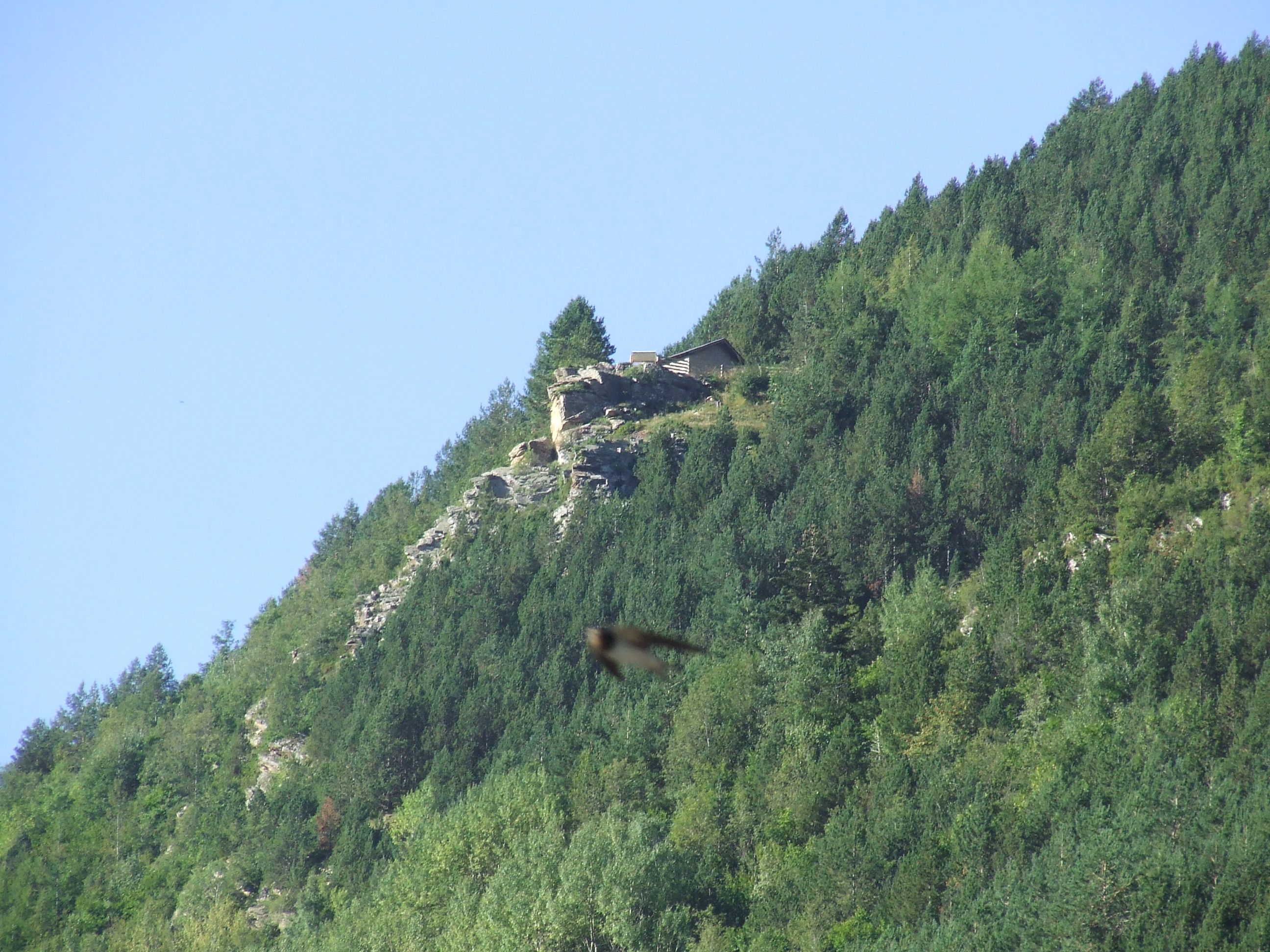 La Mare de Déu del Far ("Fa") (la Torre de Cabdella, Pallars Jussà)